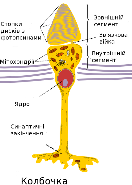 Колбочка